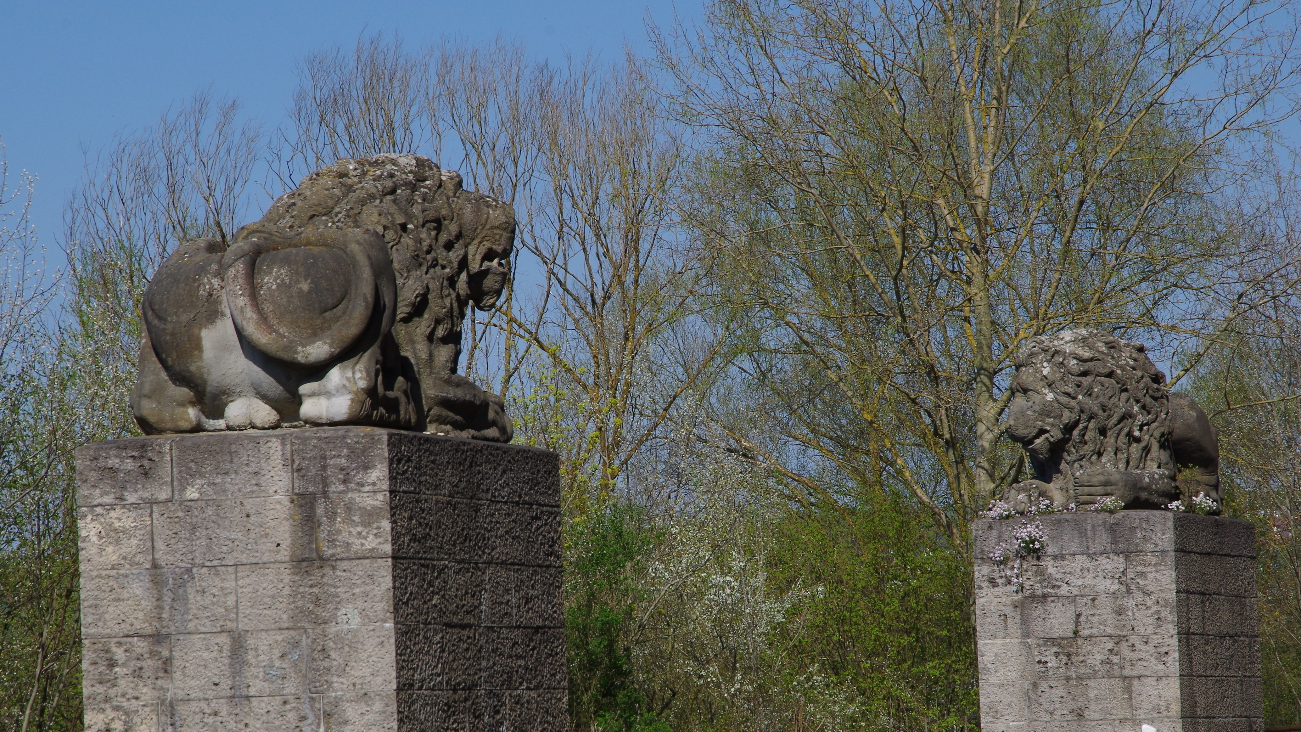 Löwendenkmal - Eiermühle